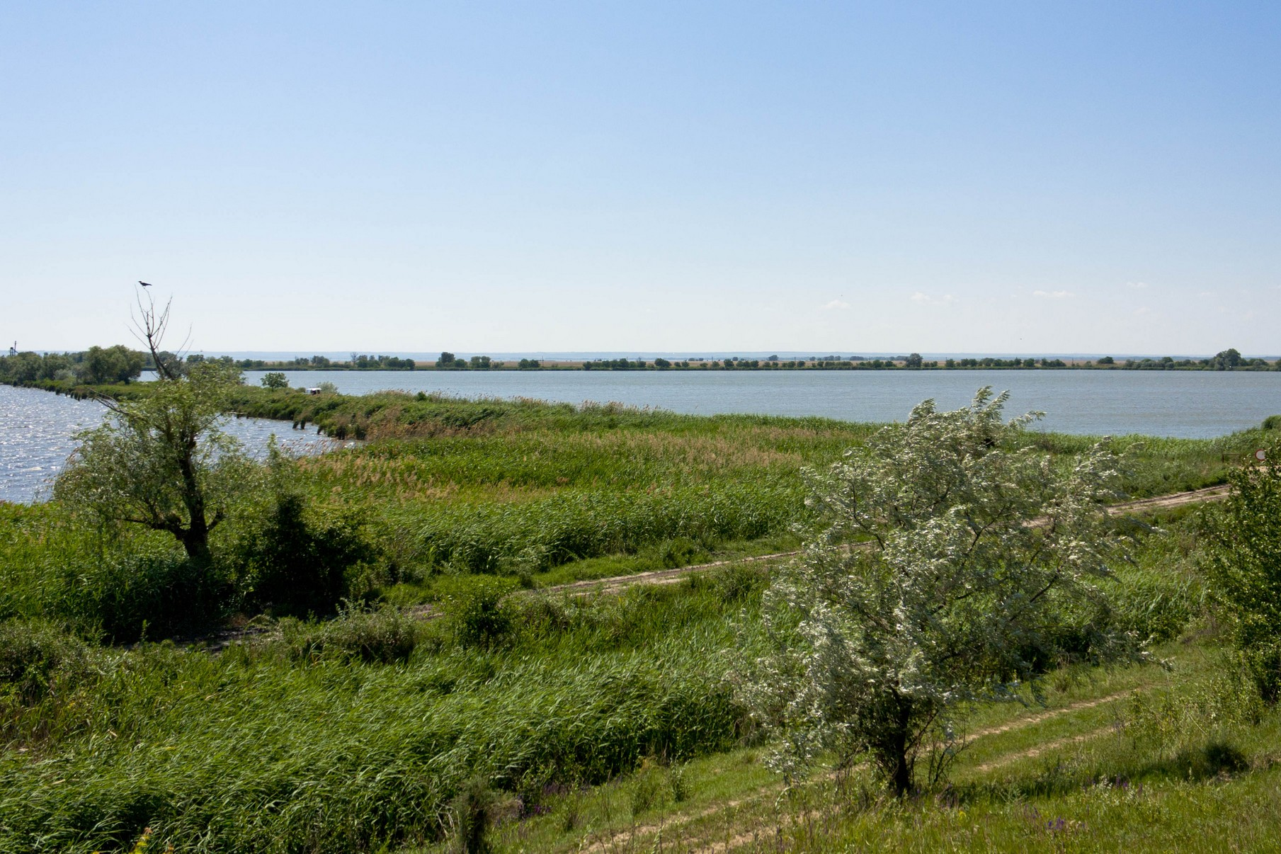 «Дністровські плавні»